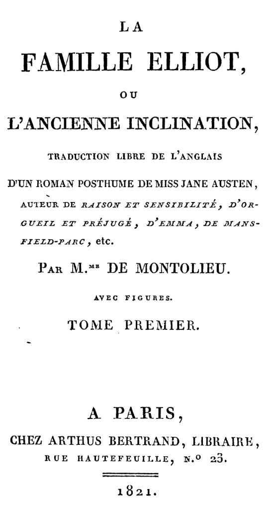 Page de titre de la première édition de la traduction libre de Persuasion par Isabelle de Montolieu